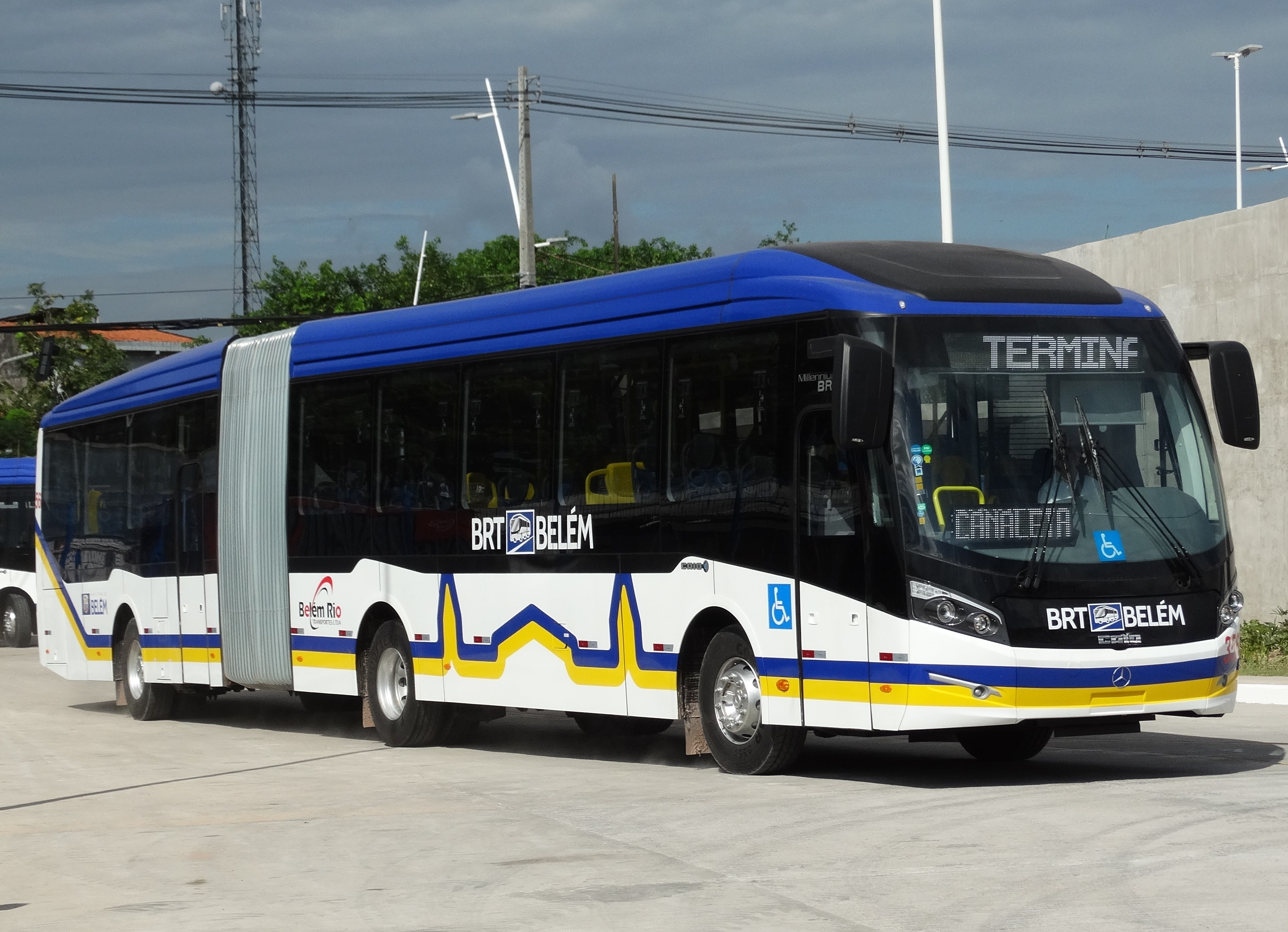 Ônibus do BRT Belém entrando no Terminal de Integração.